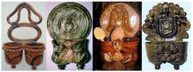 Aplique de pared para depositar las cucharas (de madera) de uso habitual en la cocina tradicional. Pieza alfarera de loza, típica de Estella (Navarra). De izq. a dcha: reproducción del conservado en el Museo Etnográfico de Arteta; cucharero atribuído al taller de Echeverría, con el sagrado corazón y la cruz; copia moderna con cucharas de madera, y cucharero de Ybicuru o Torres con el escudo de Estella.